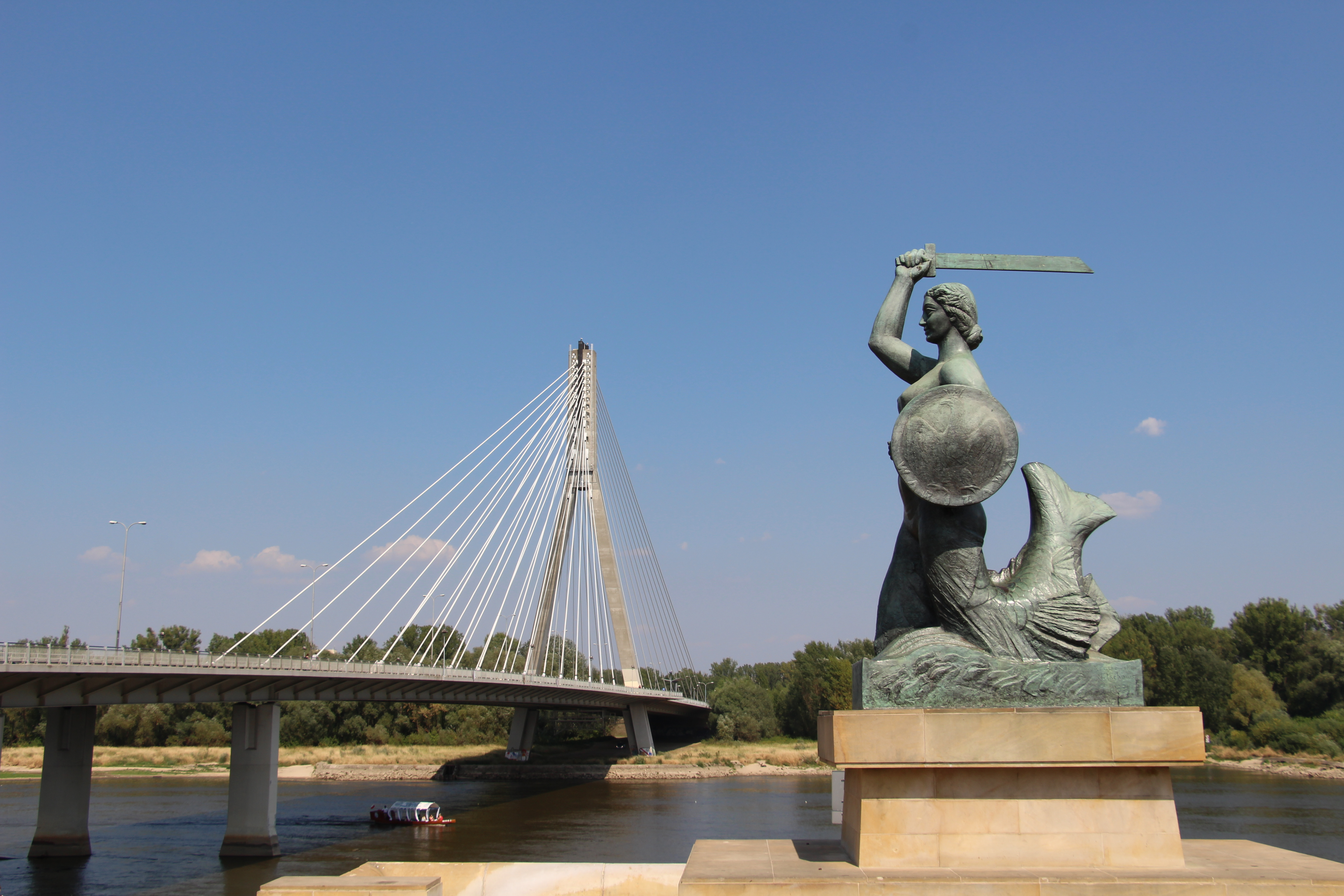 Wybrzeże Kościuszkowskie Mermaid of Warsaw in Powiśle, made of gunmetal. Sculptor Ludwik Nitschow 1939. Świętokrzyski Bridge. Arch. Mostostal Warszawa SA. 1998-2000